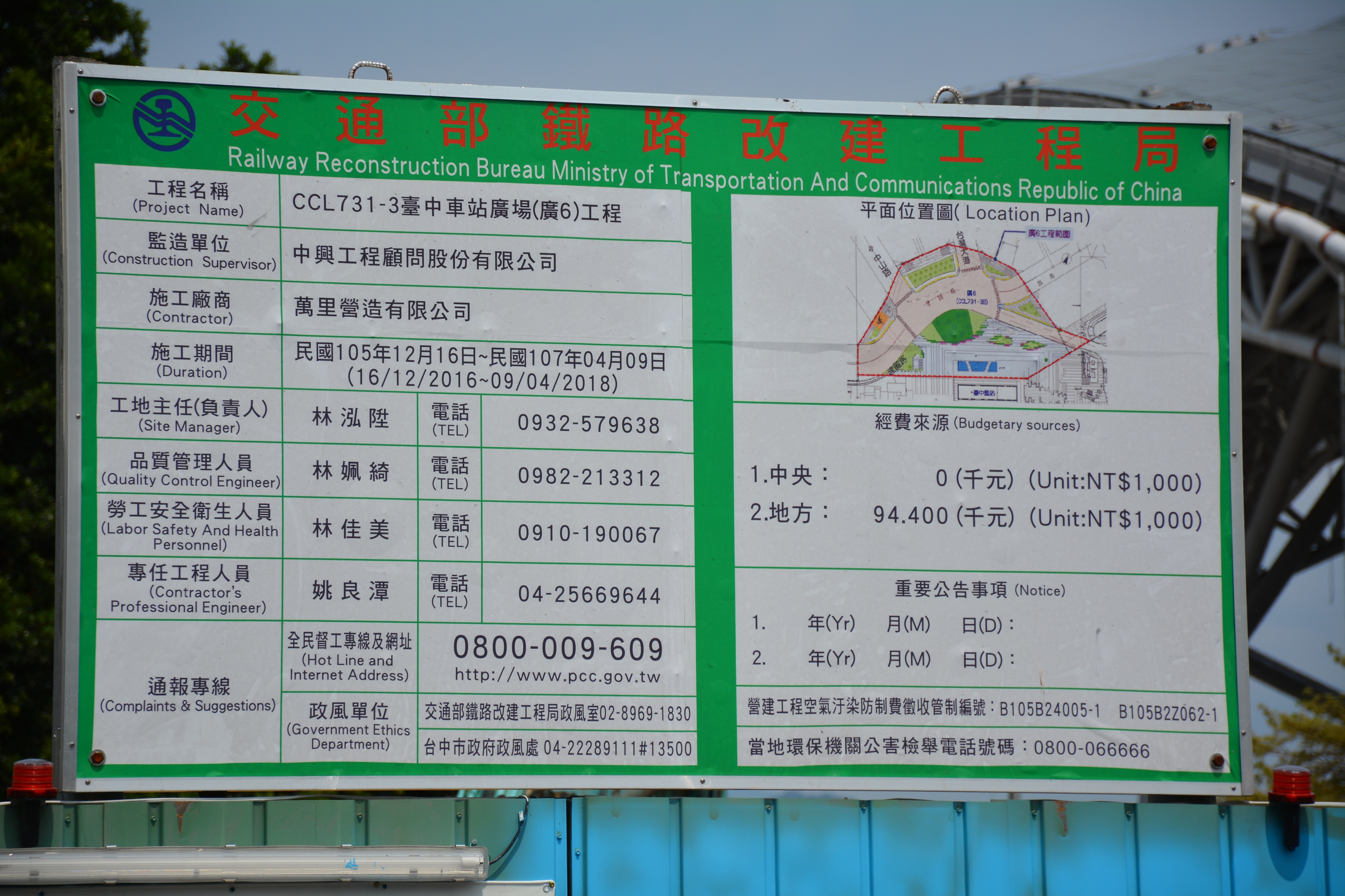 交通部鐵路改建工程局「CCL731-3 臺中車站廣場（廣6）工程」告示牌。